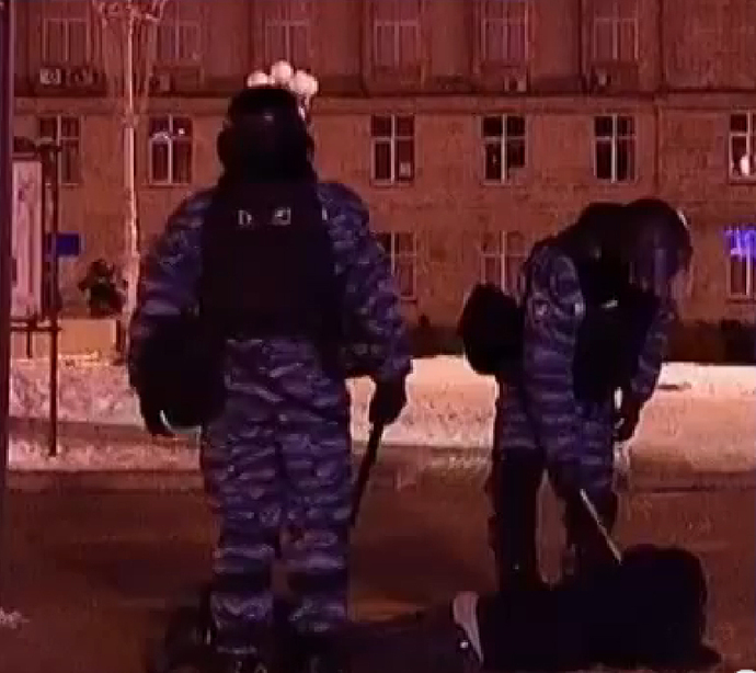 Нічний штурм Черкаської ОДА 27 ciчня 2014.